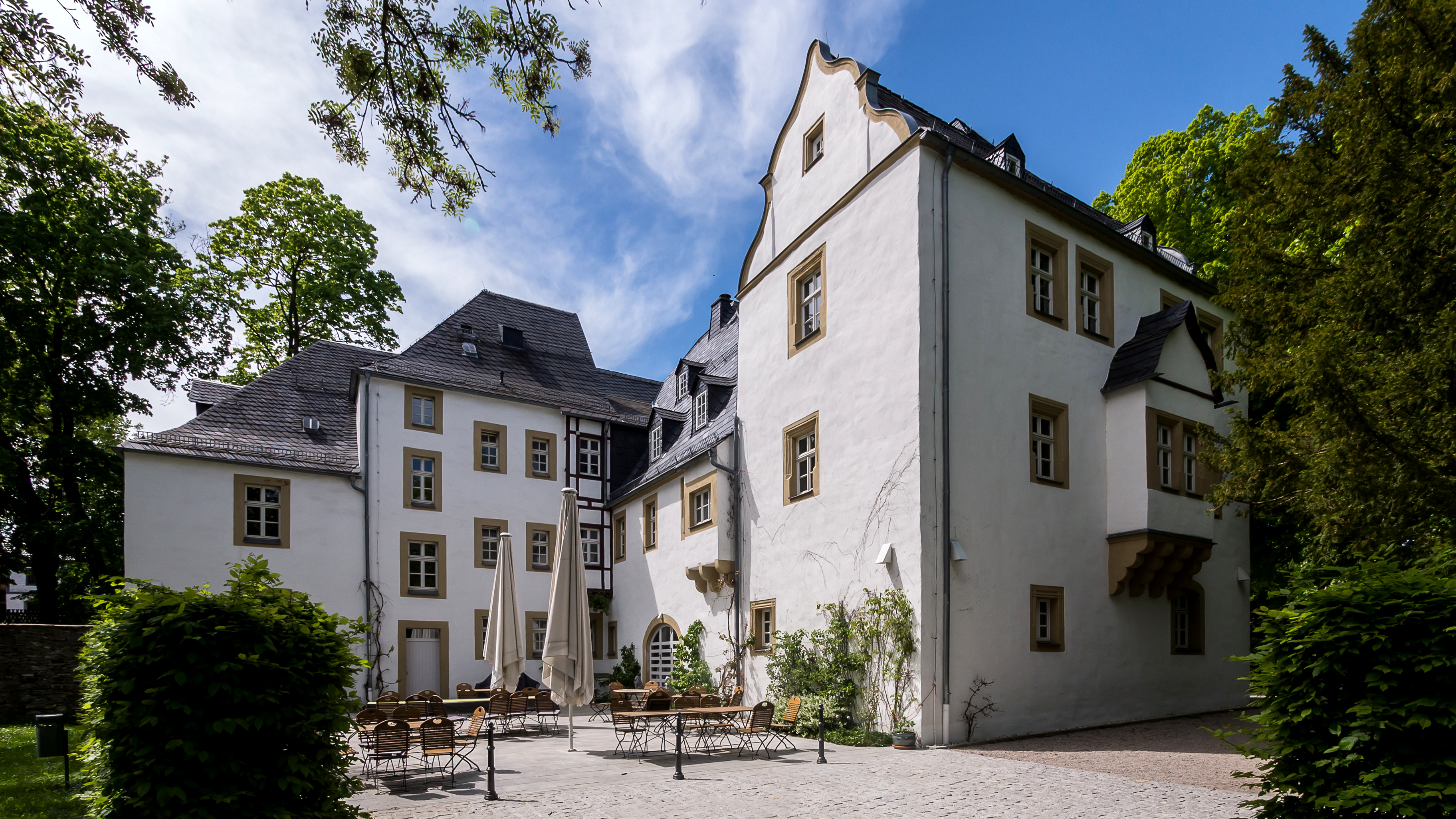 Eyba 23 Schloss